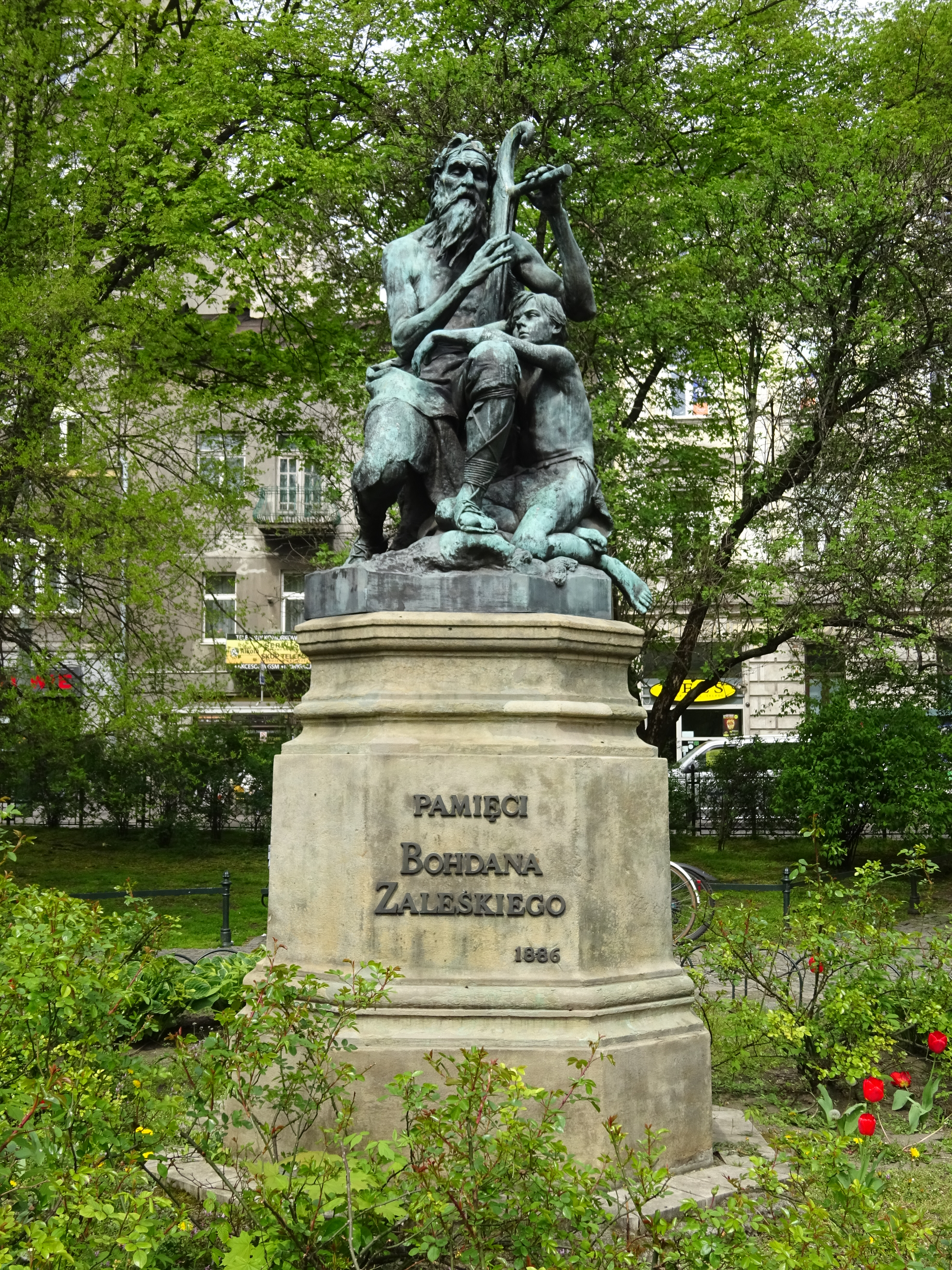 Pomnik Pamięci Bohdana Zaleskiego przedstawiający ,,Grupę Bojana" na Plantach, koło Fontanny przy Barbakanie. Kraków, 2016.